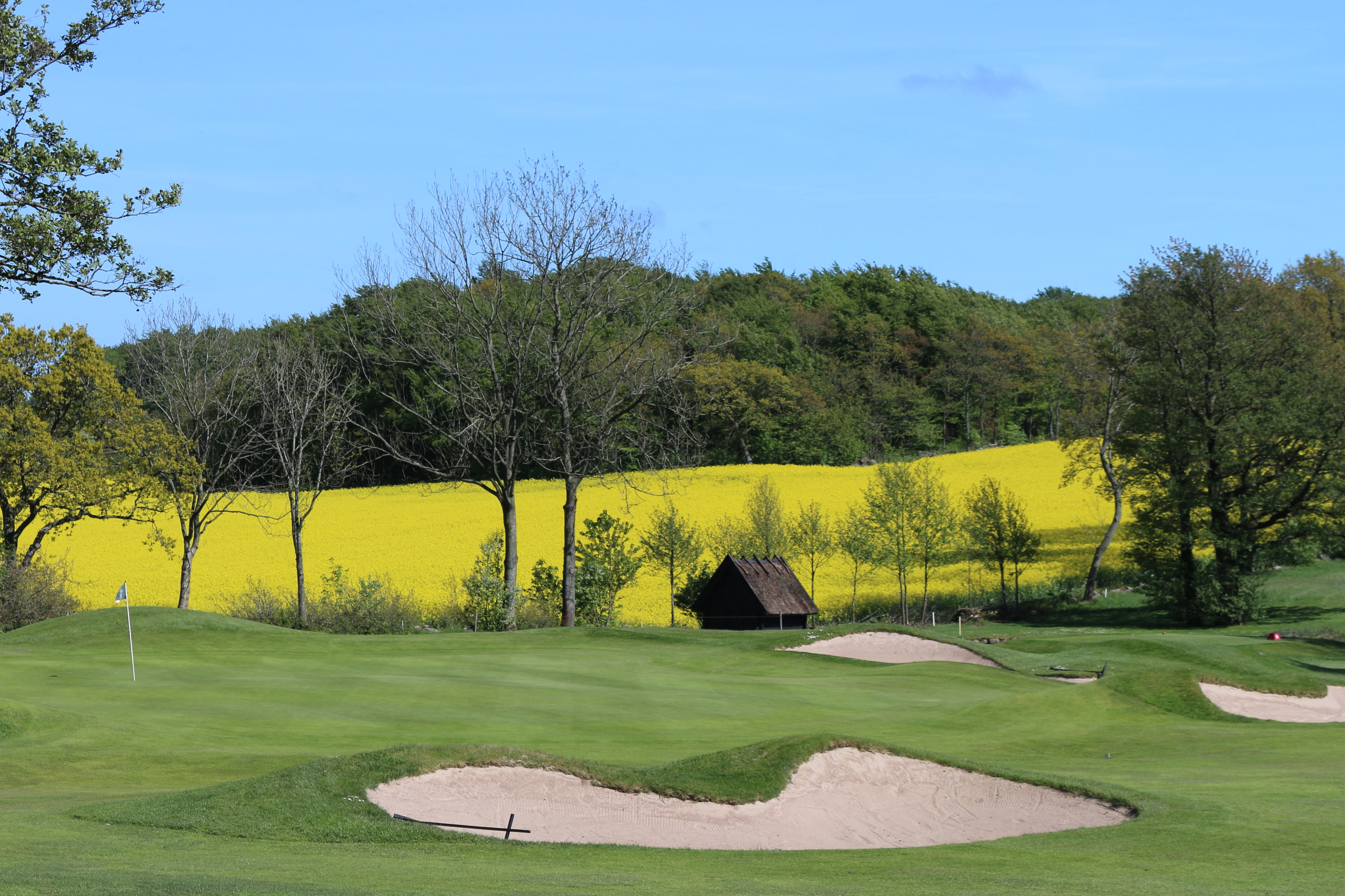 Båstads golfklubb